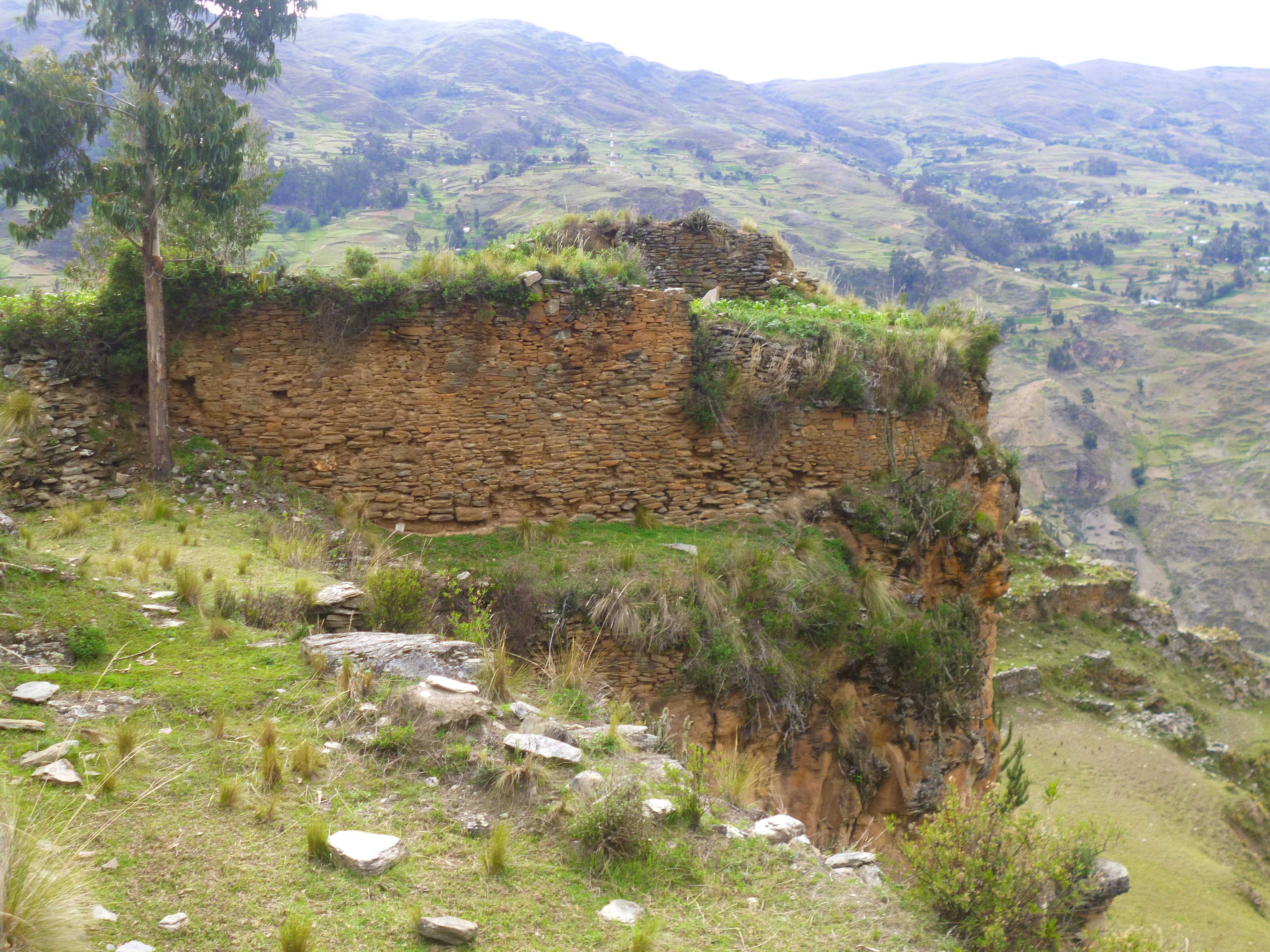 Estructuras arquitectónicas del sitio arqueológico de Huaroj.